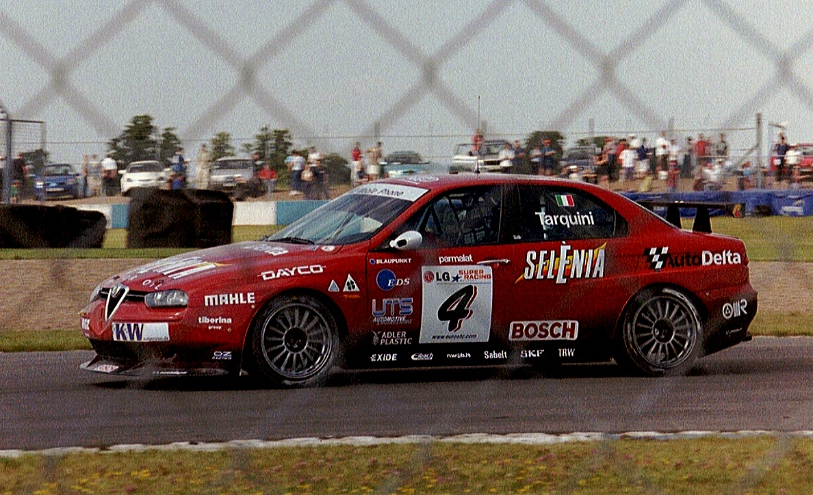 Gabriele Tarquini - Alfa Romeo 156 GTA - ETCC Donington 2003